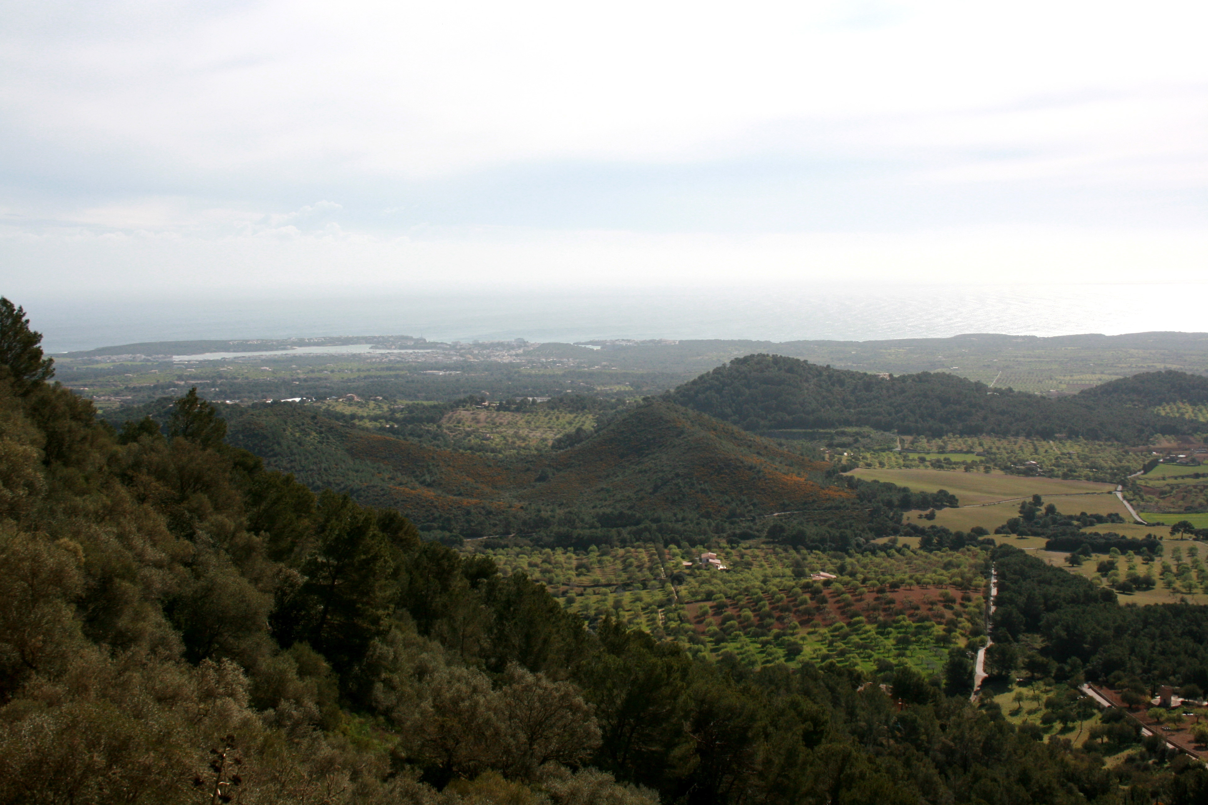 View from Castell de Santueri in Felanitx, Mallorca